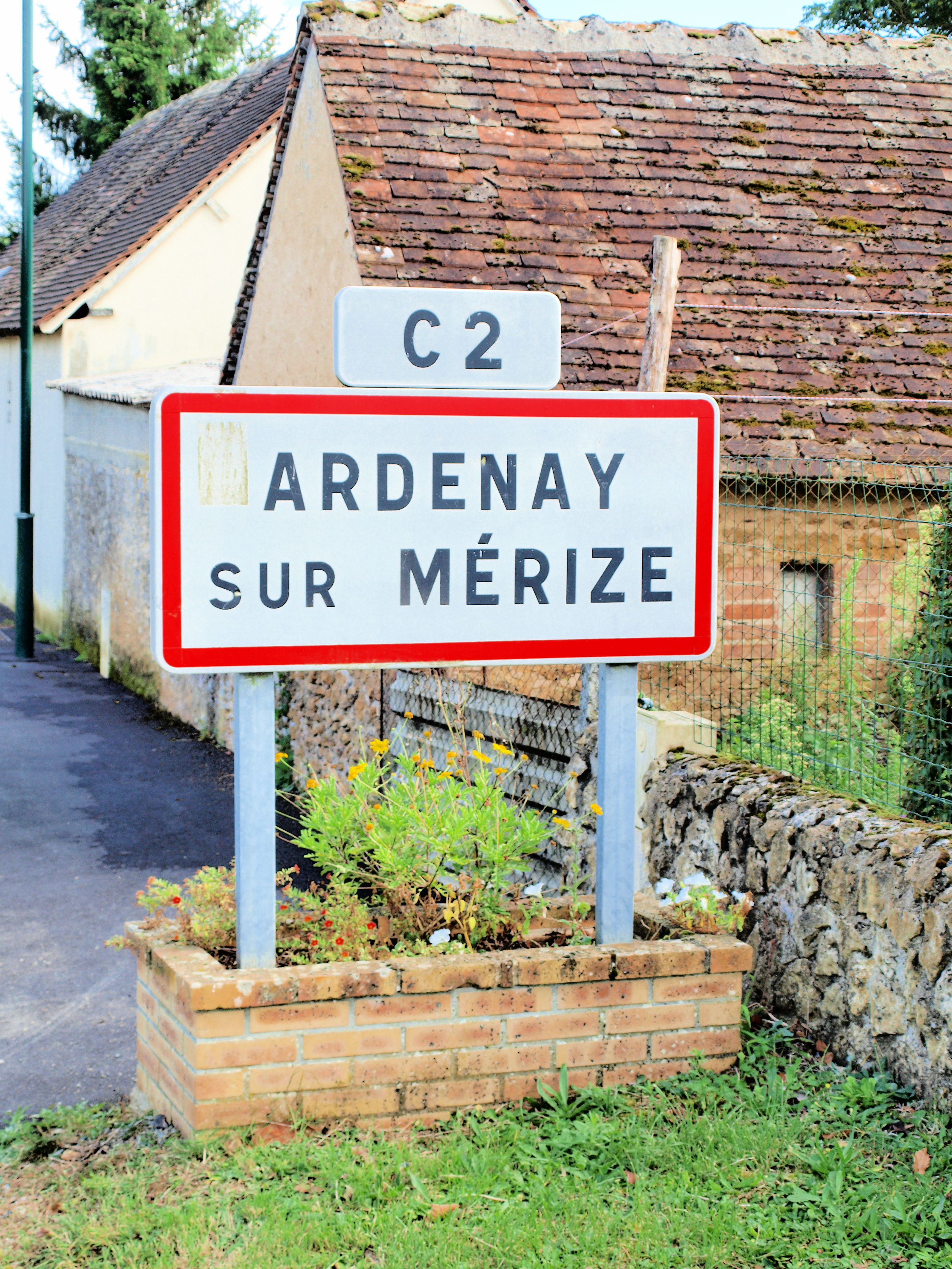 Ardenay-sur-Mérize (Sarthe, France) ; panneau d'agglomération